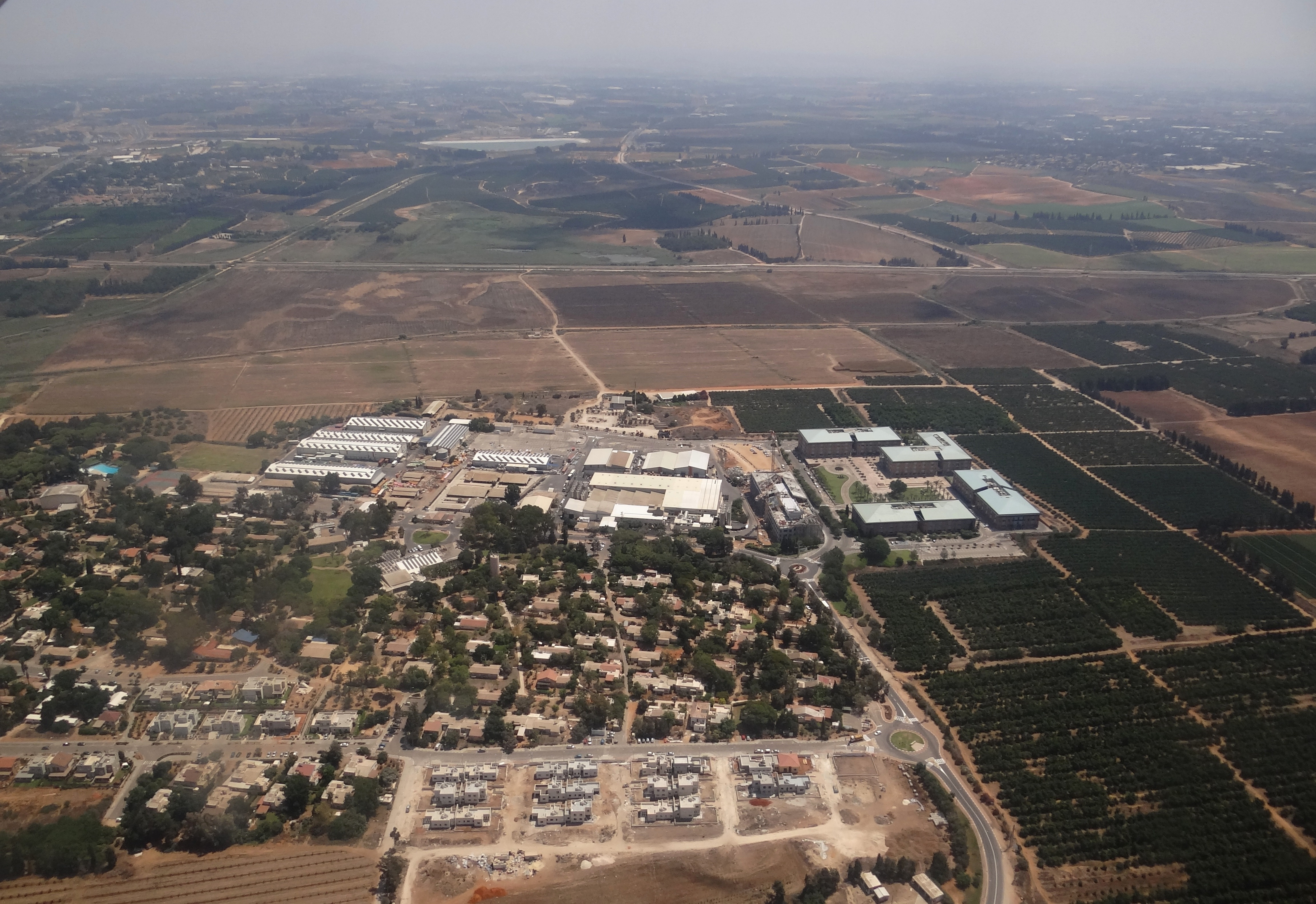 קיבוץ יקום בשרון